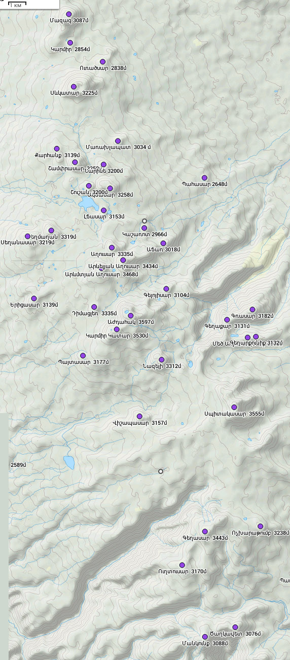 Գեղամա 3000+քարտեզ